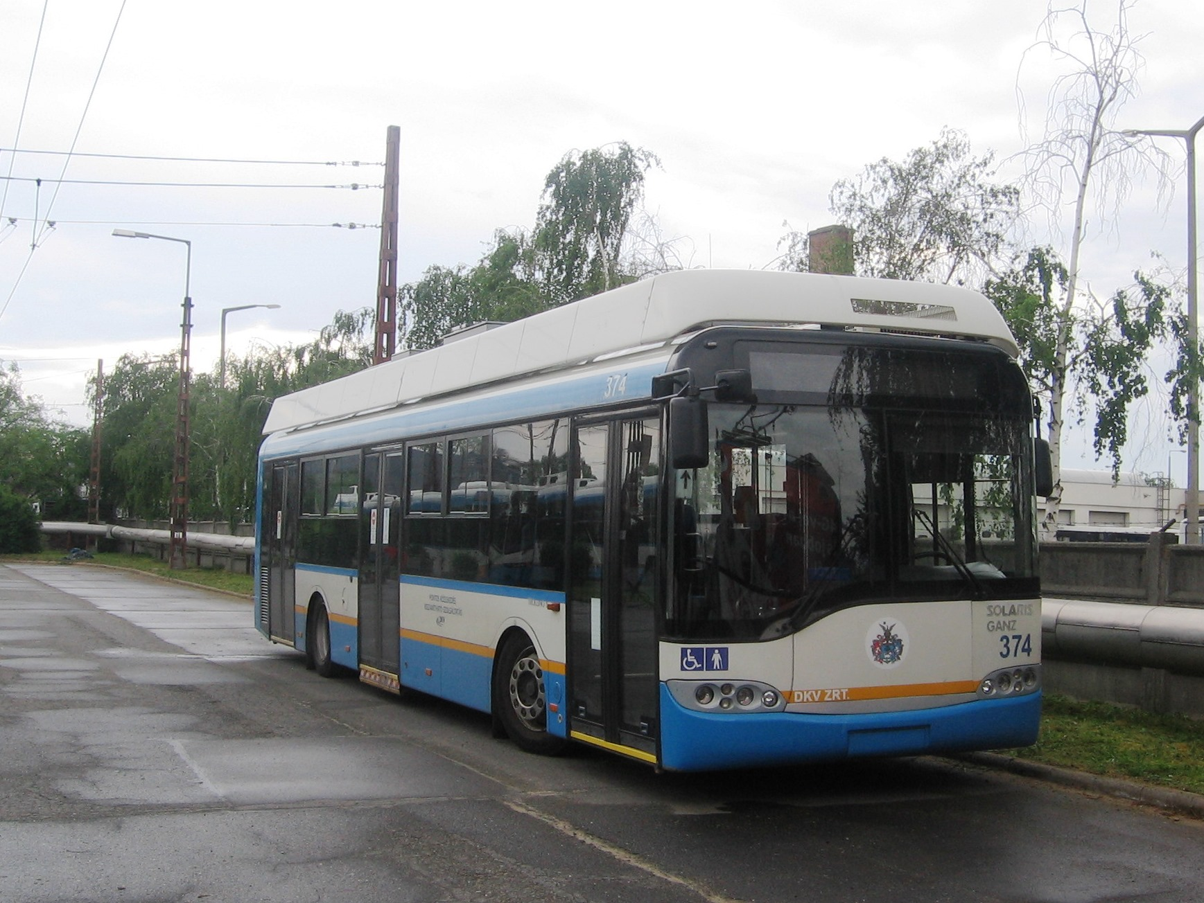 Psz: 374